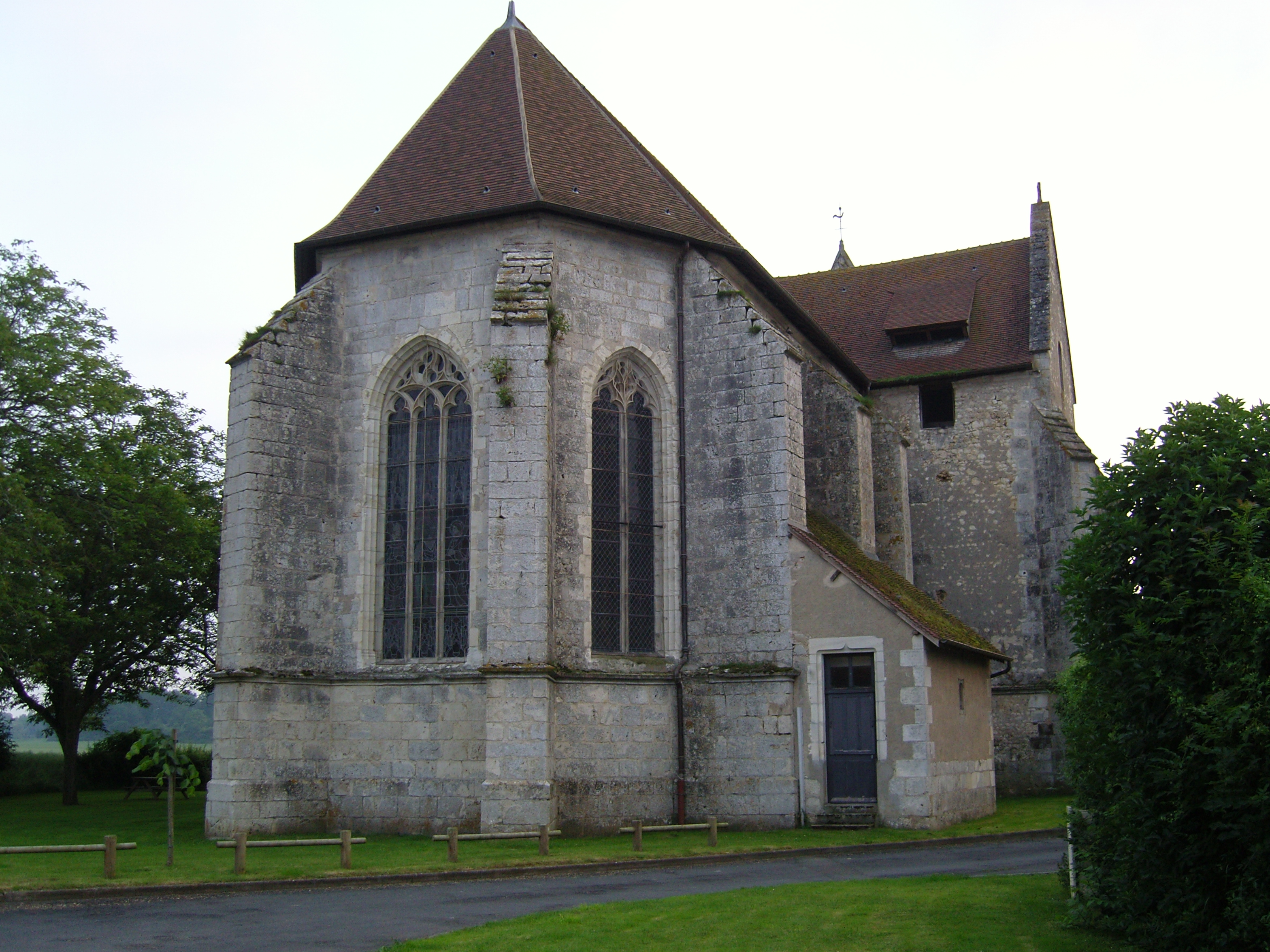 Eglise Saint Jean Baptiste - VIème siècle